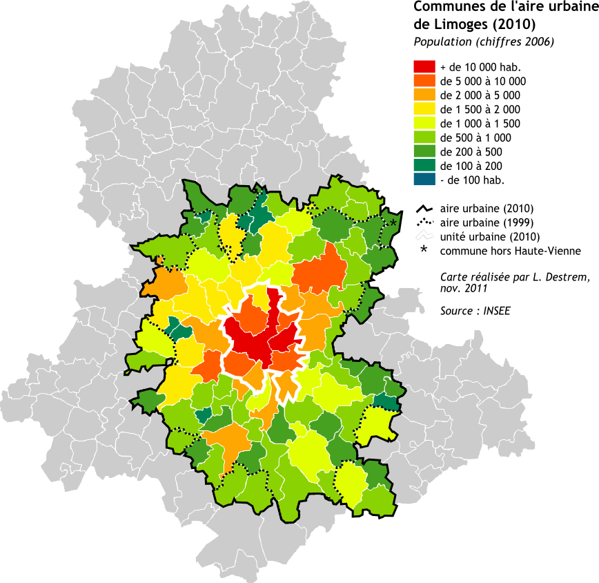 Carte des communes de l'aire urbaine et de l'unité urbaine de Limoges (population 2006)